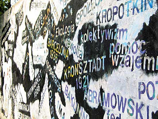 Zdjęcie ze strony skłotu Rozbrat. Za zgodą kolektywu.